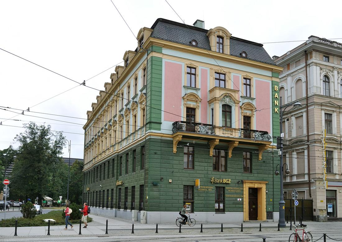 Gmach banku na pl. Teatralnym.